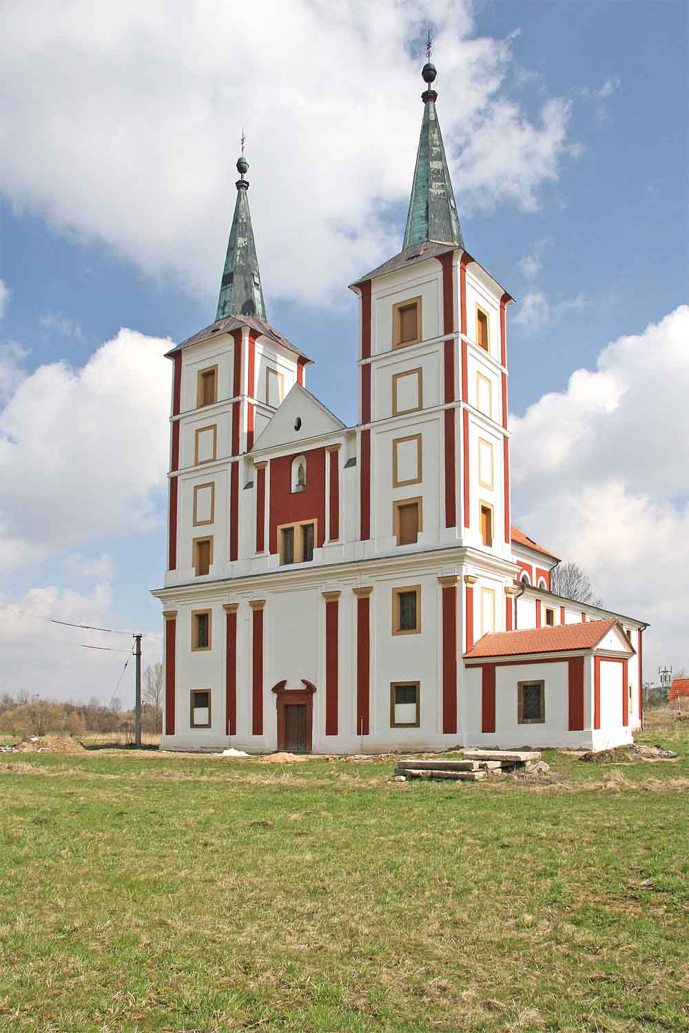 Barokní kostel Sv. Markéty v místech bývalého Podlažického kláštera